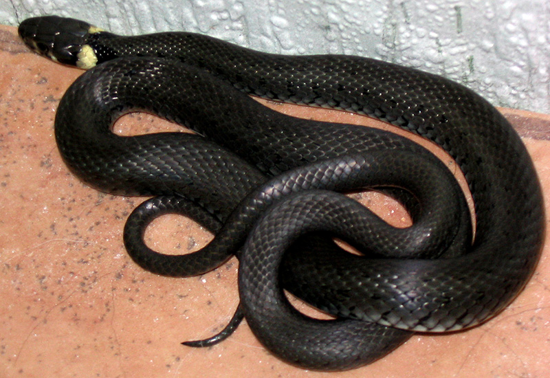 Beschreibung: Ringelnatter (Natrix_natrix) Fotograf: Darkone, 14. September 2003